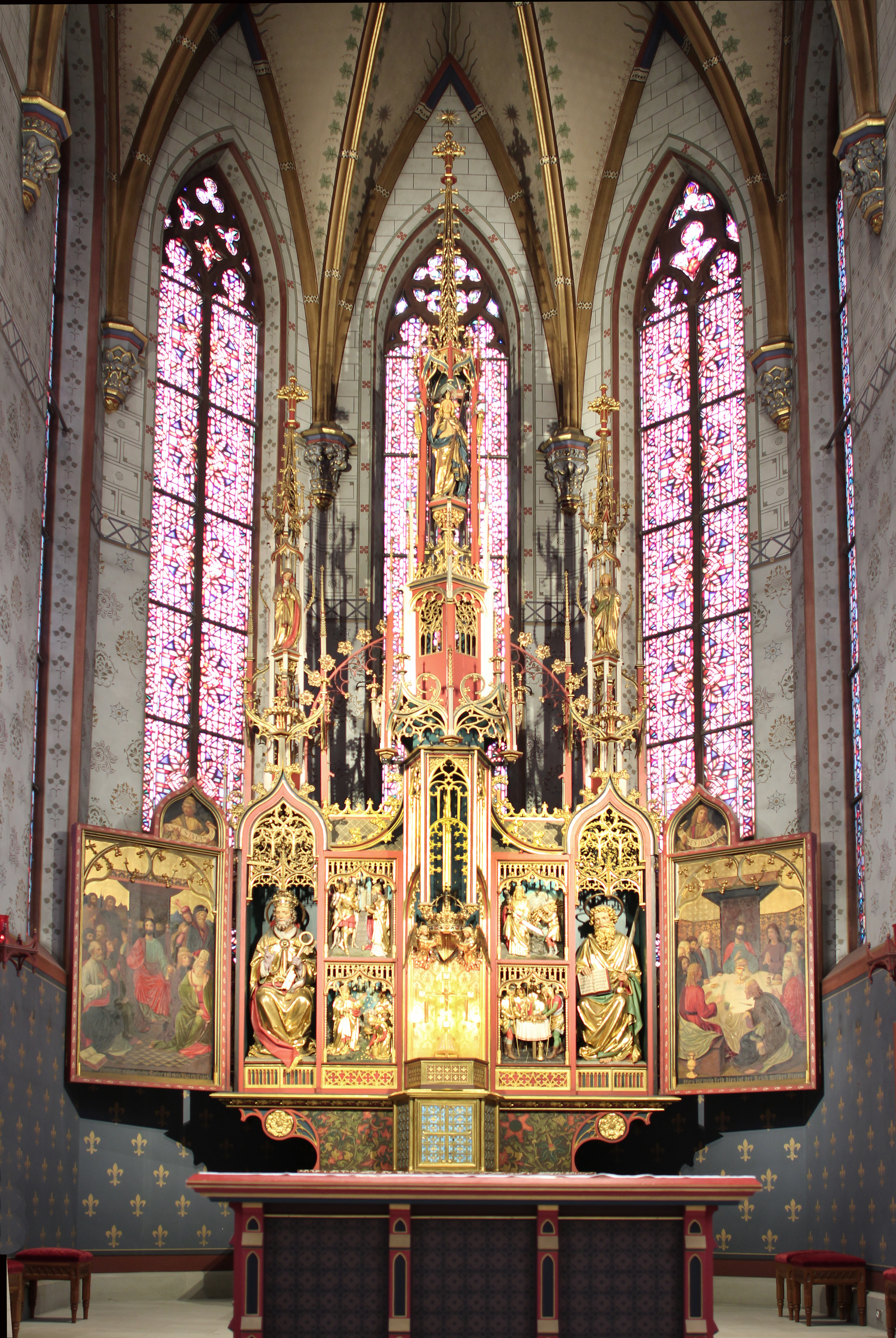 Römisch-katholische Pfarrkirche St. Peter und Paul Winterthur-Neuwiesen, Hauptaltar